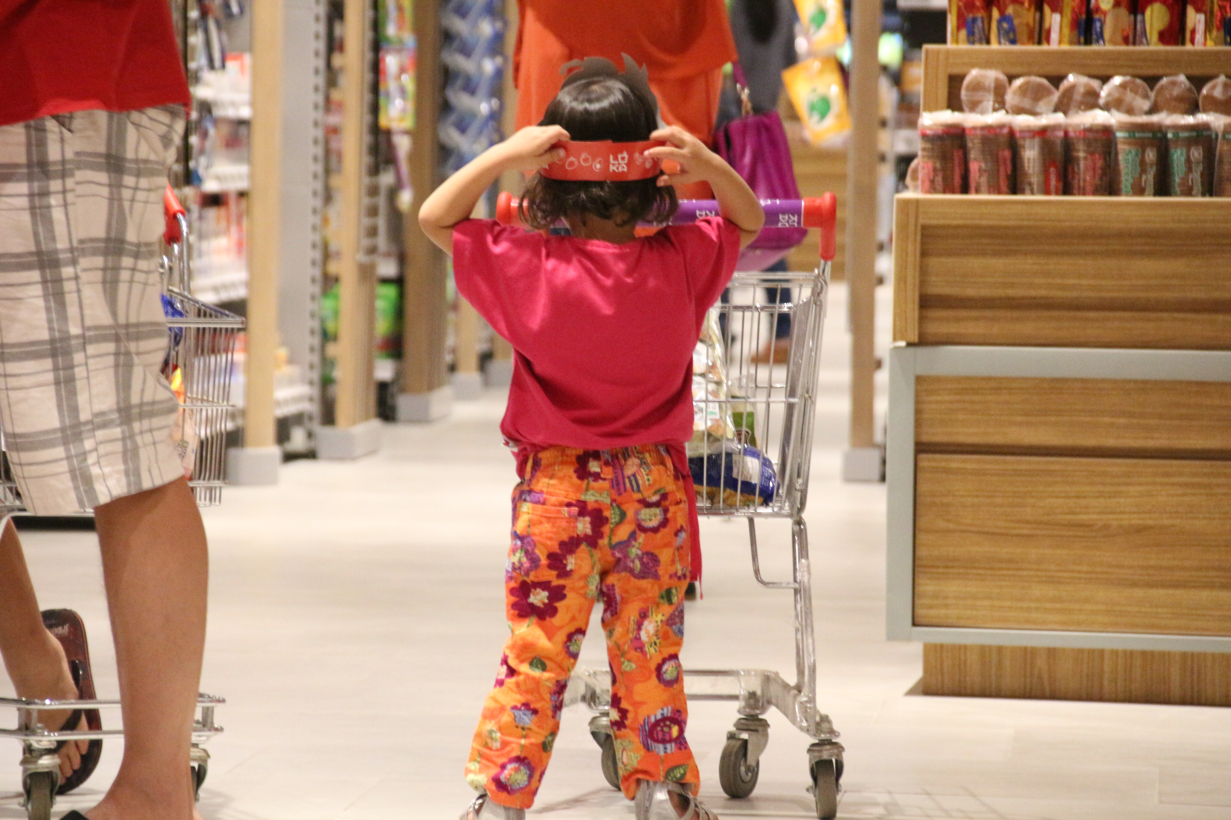 Seorang anak sedang asik berbelanja menggunakan troli khusus anak